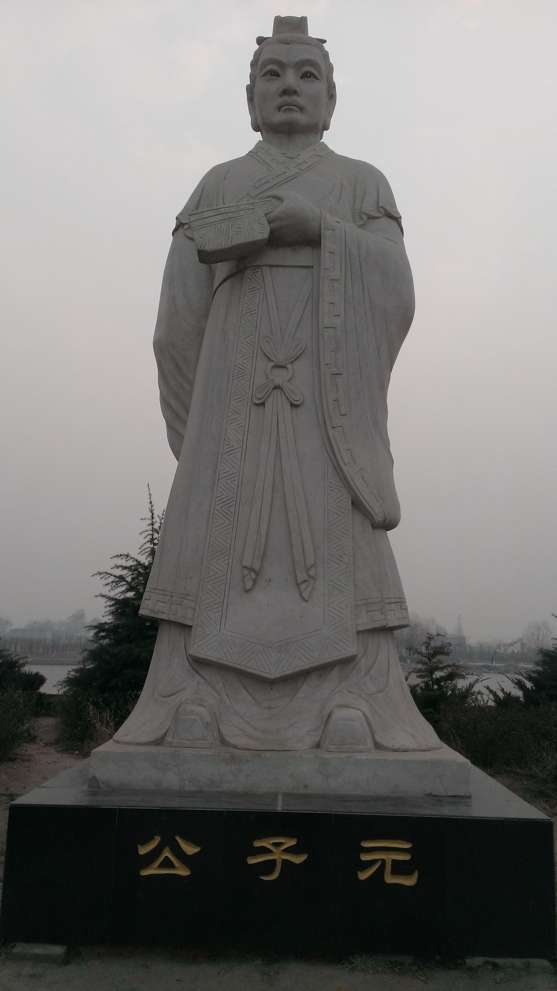 元氏公园里的公子元